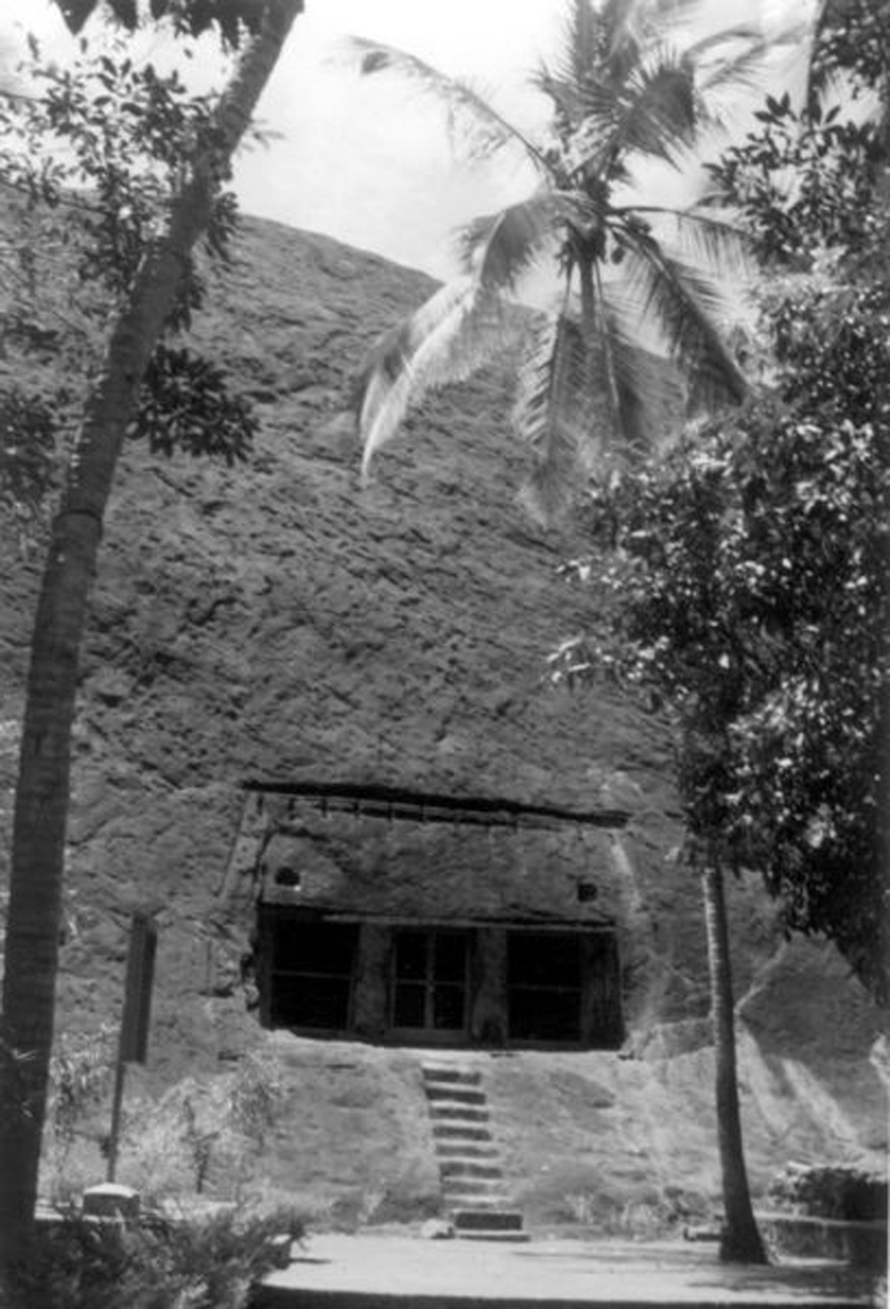 തിരുനന്ദിക്കര ഗുഹ